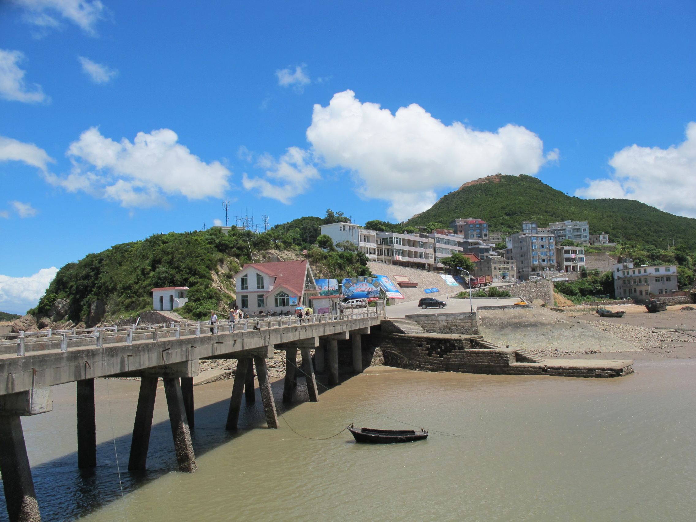 大门乌仙头码头